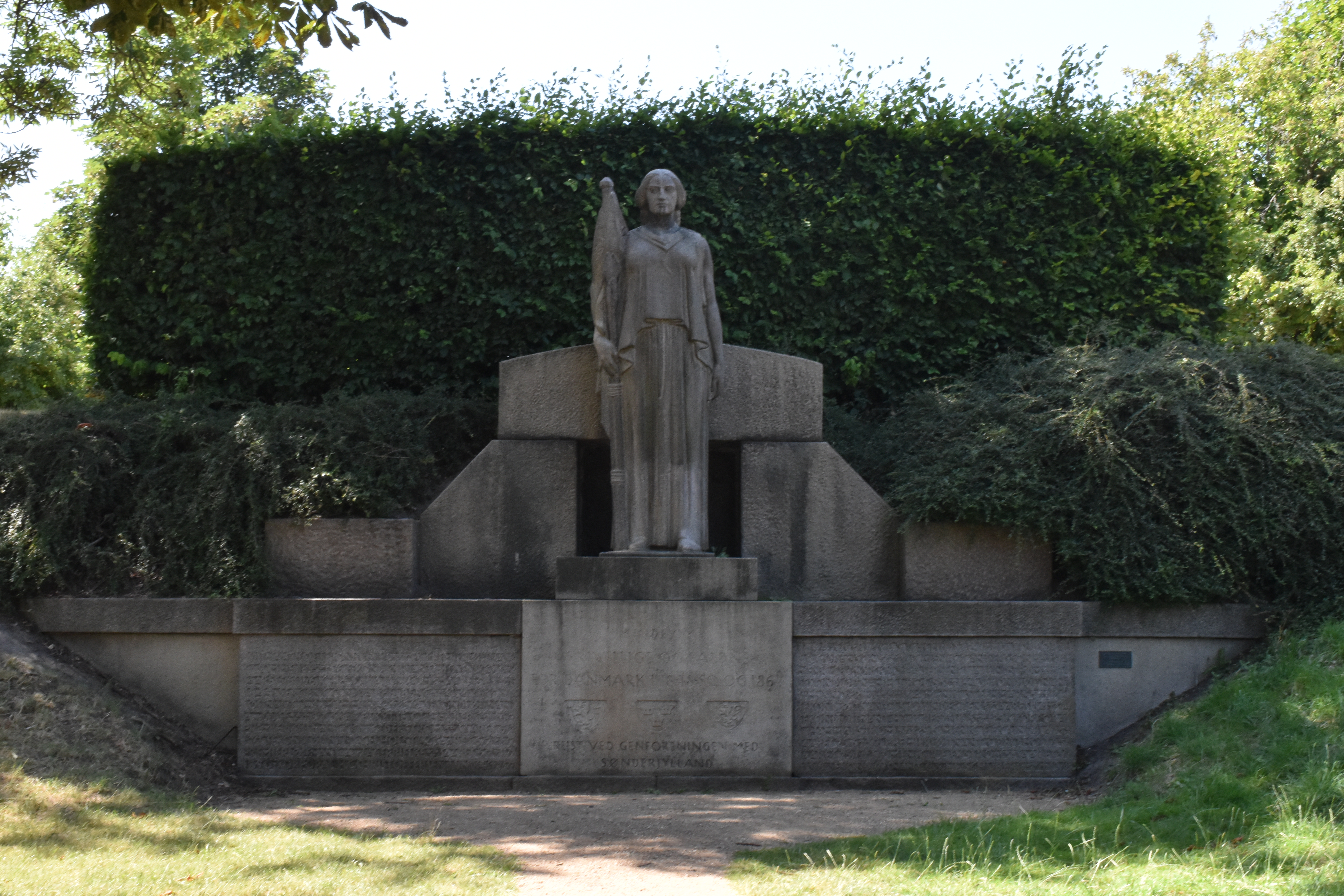 Mindesmærke for frivillige og faldne on Smedelinien (Kastellet) in Copenhagen, Denmark